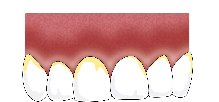 Illustrerende bilde av plakk